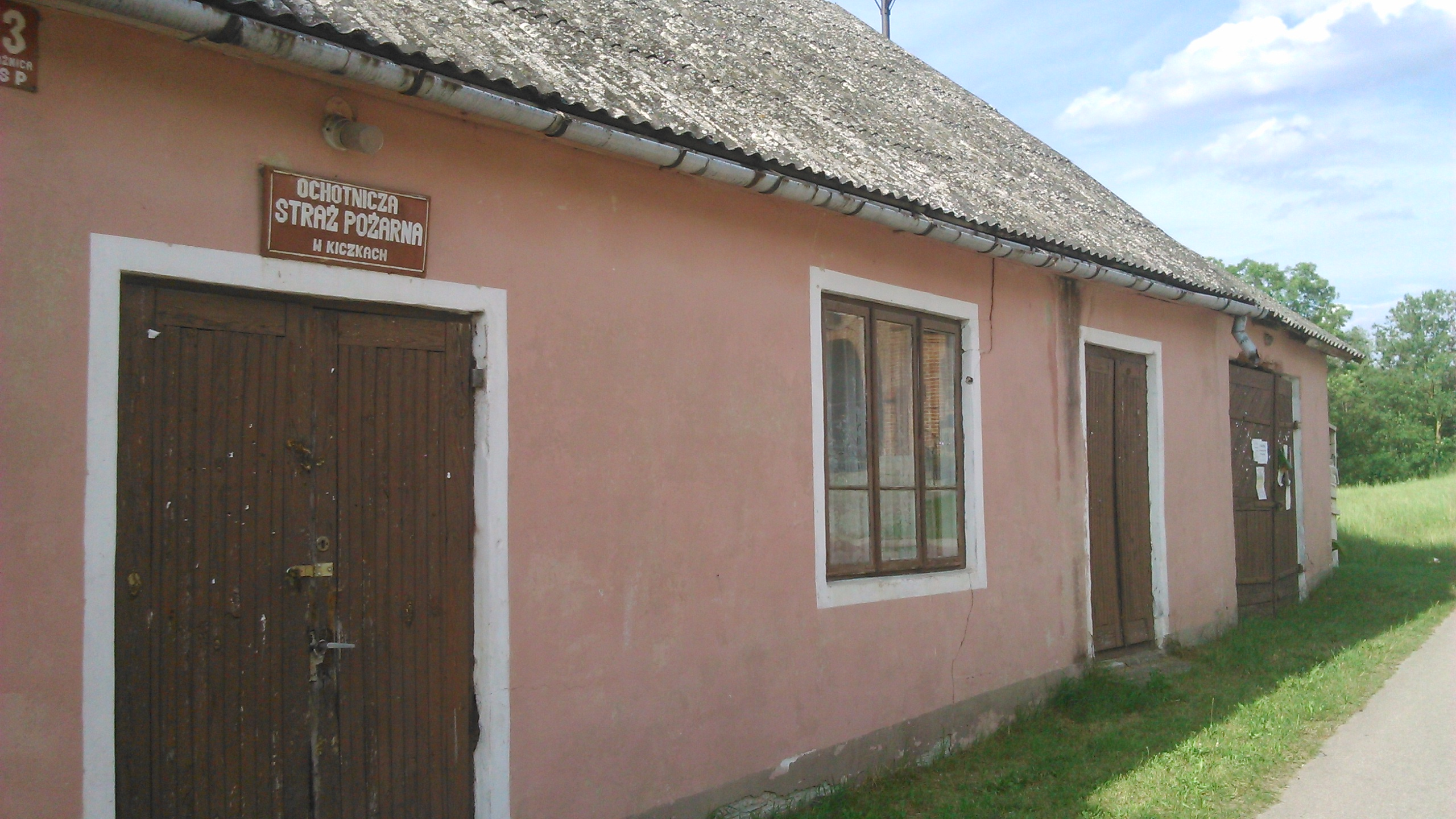 Ochotnicza Straż Pożarna w Kiczkach